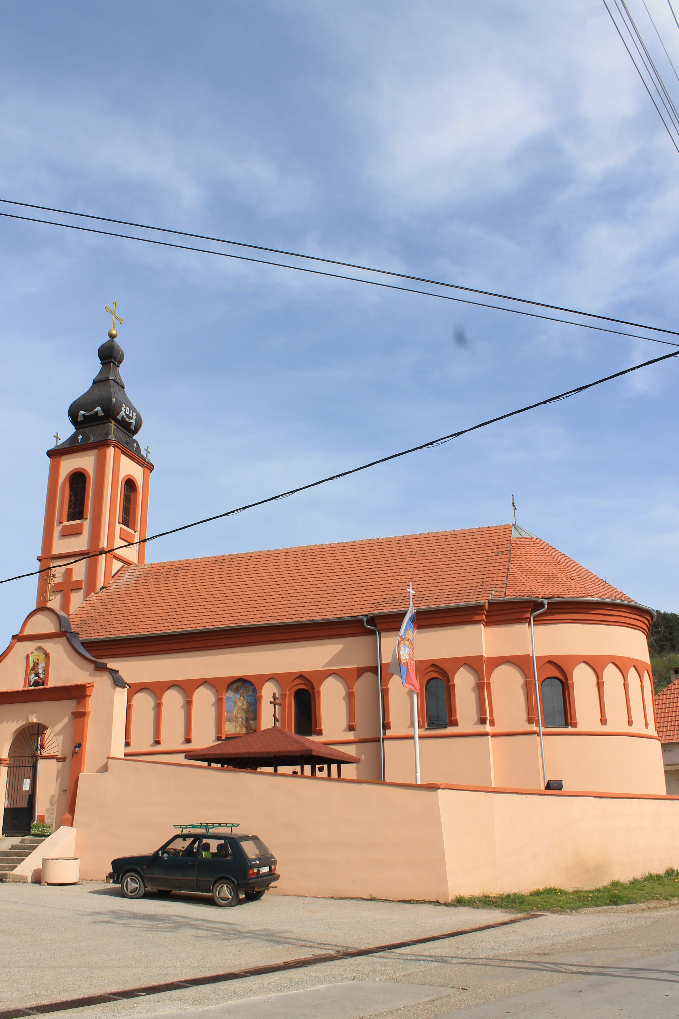 Crkva Sv. Georgija (Ležimir)